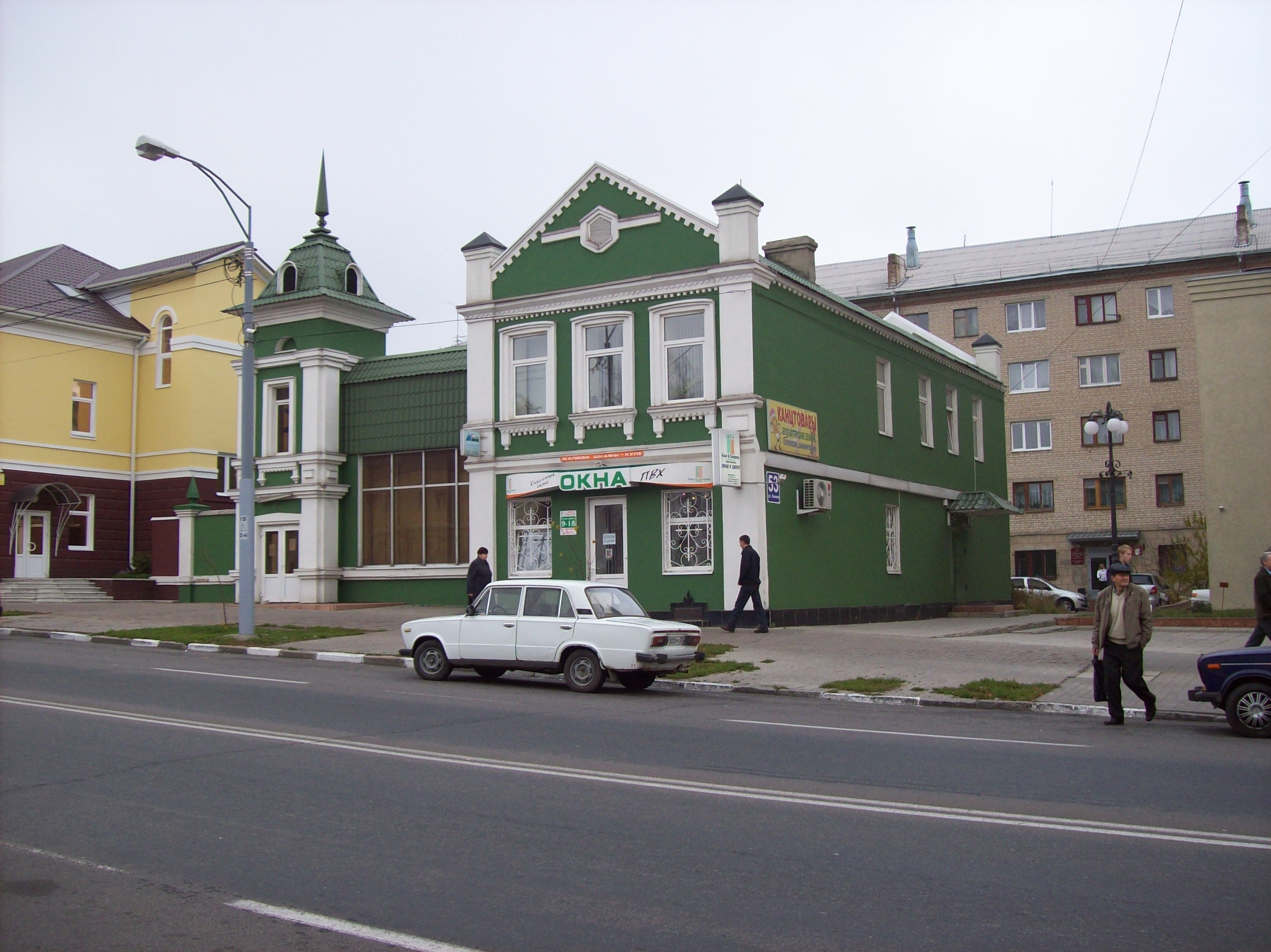 Старый Оскол. Дом на улице Ленина.